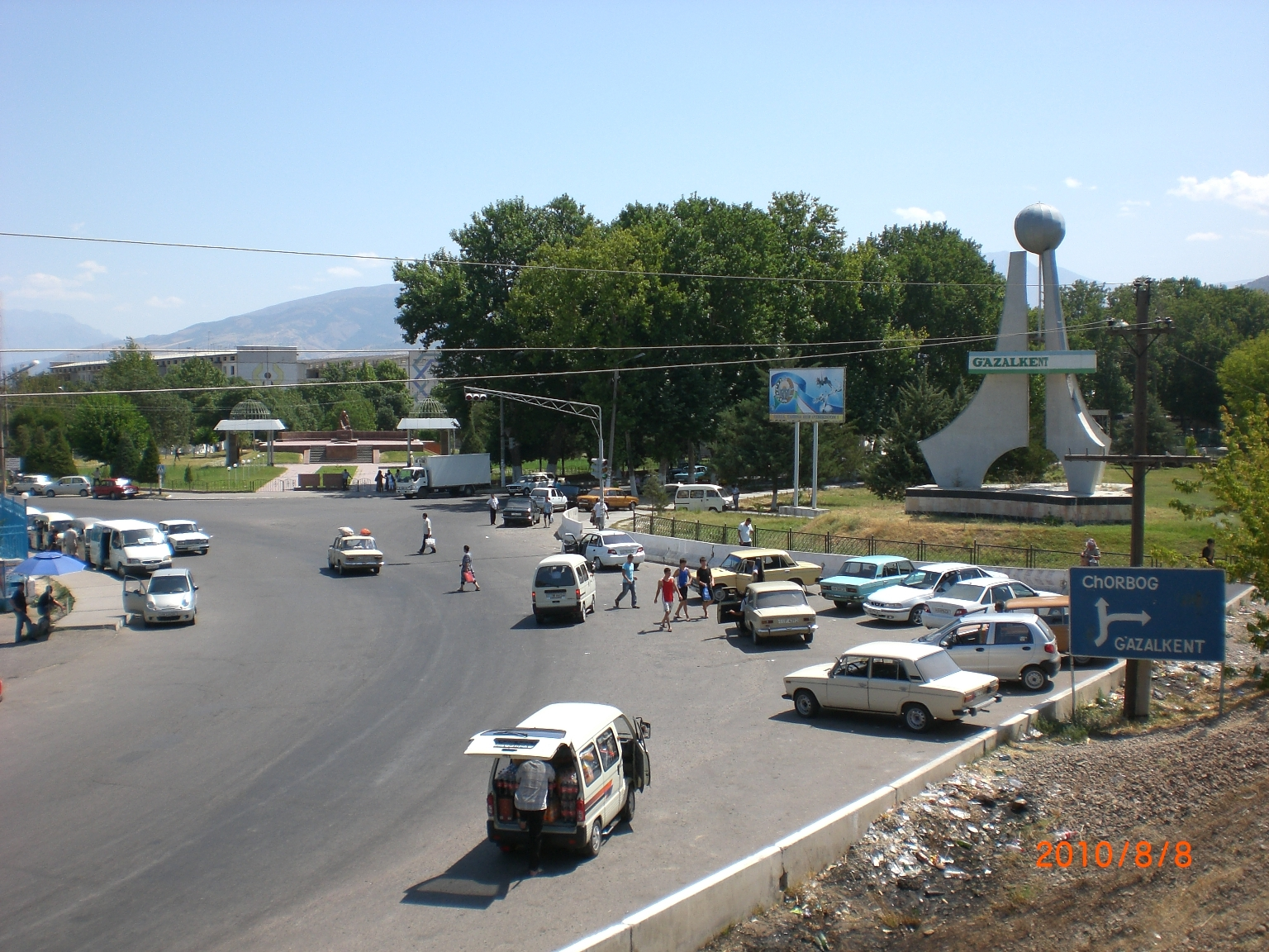 Gazalkent city/ Город Газалкент. Въезд со стороны города Чирчик сразу после плотины. Фото сделано 8 августа 2010 года 11:23 с электрички Ходжикент - Ташкент.